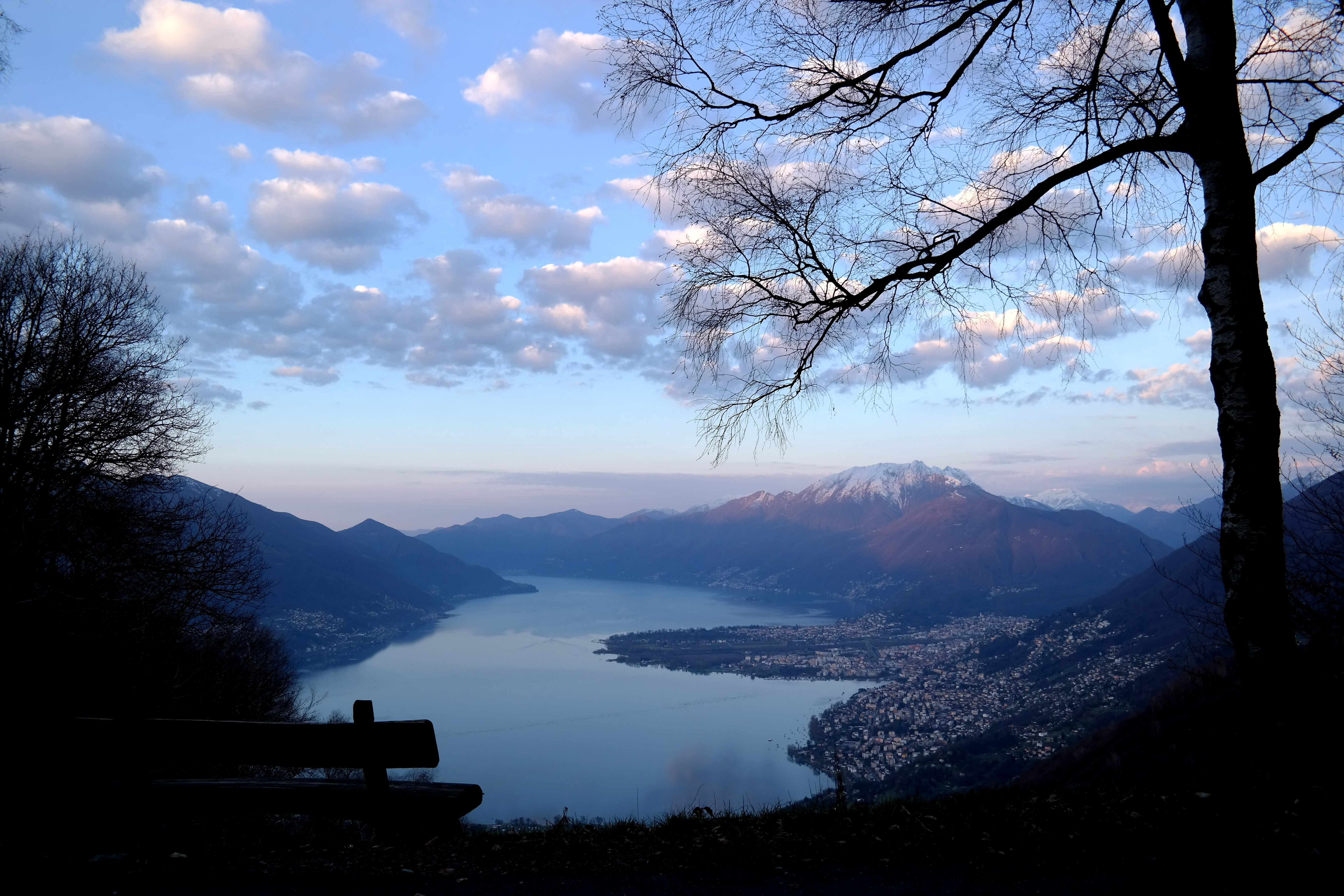 Lago Maggiore